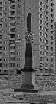 Dresden: Im Stadtteil Zschertnitz aufgestellte Kopie der Kursächsischen Postmeilensäule vom Wilsdruffer Tor